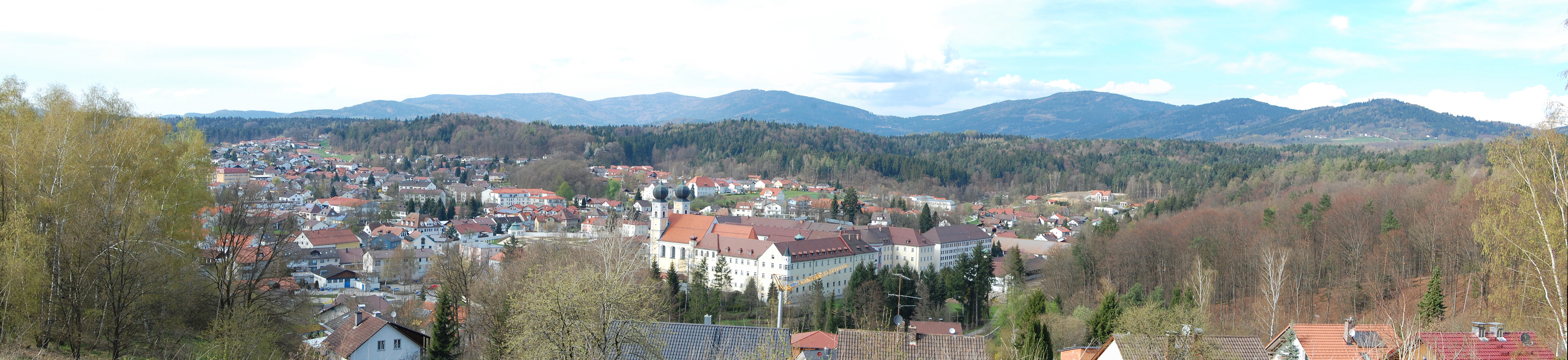 Panoramafoto von Metten